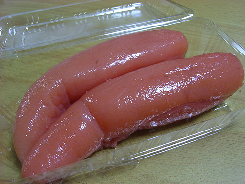 激ウマなタラコ。超デカい。魚卵最高。061008_Yoyogi-koen park